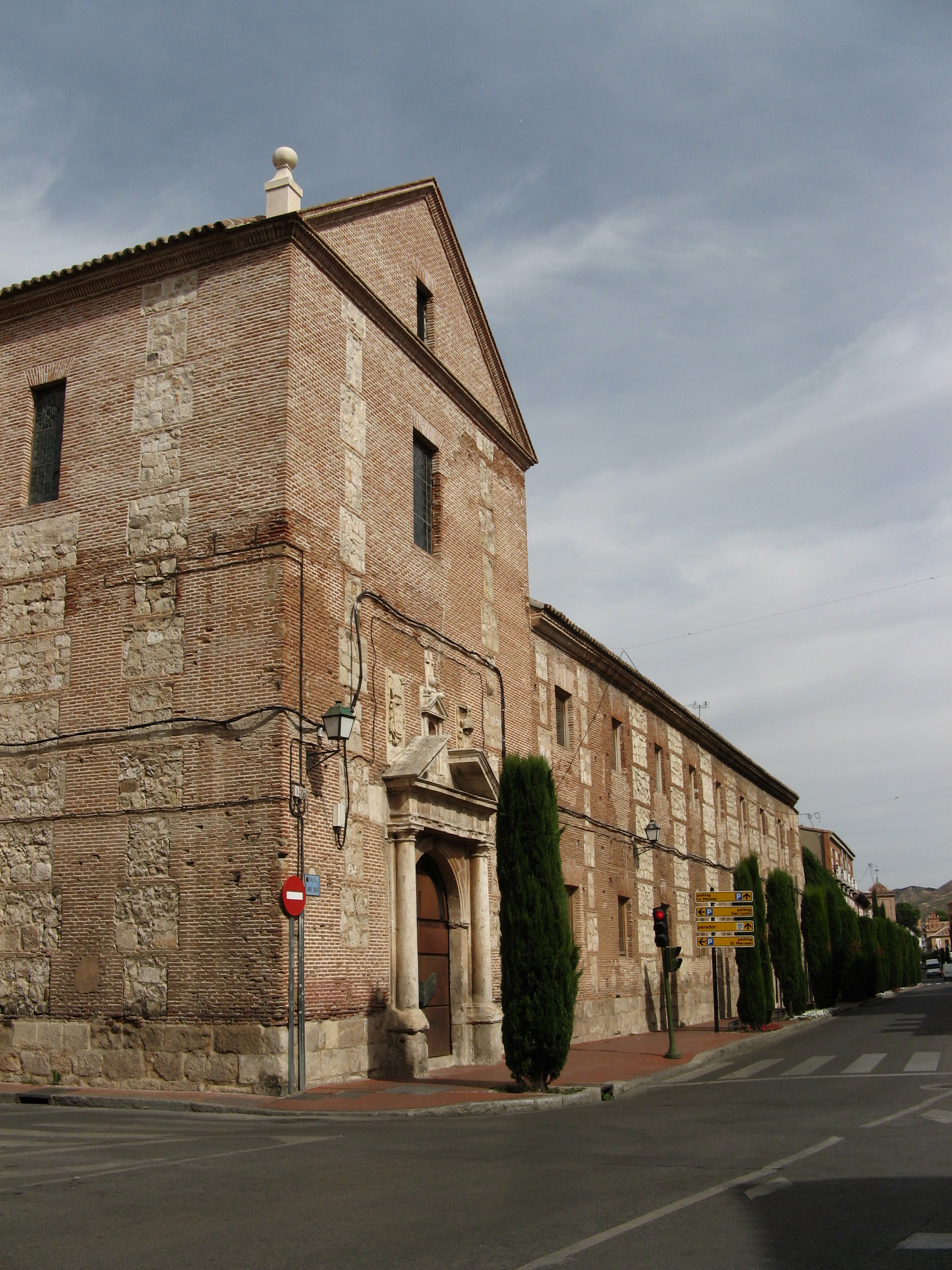 Calle Santa Úrsula. Alcalá de Henares. Comunidad de Madrid. España